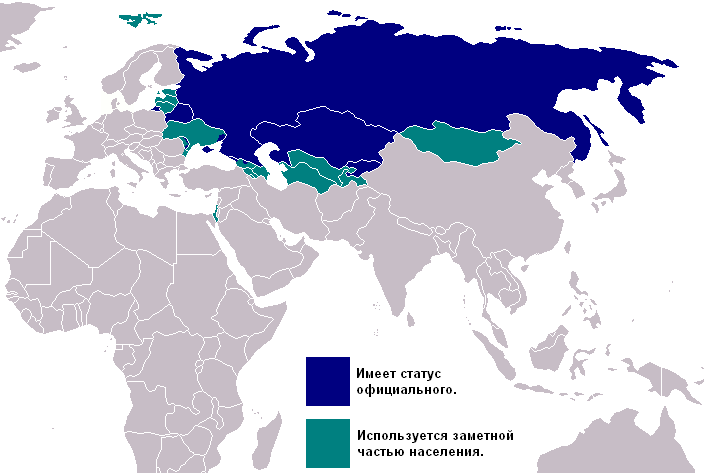 Карта распространения русского языка.